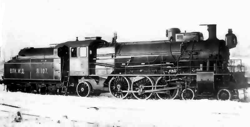 Дореволюционный паровоз серии Лп Владикавказской железной дороги.